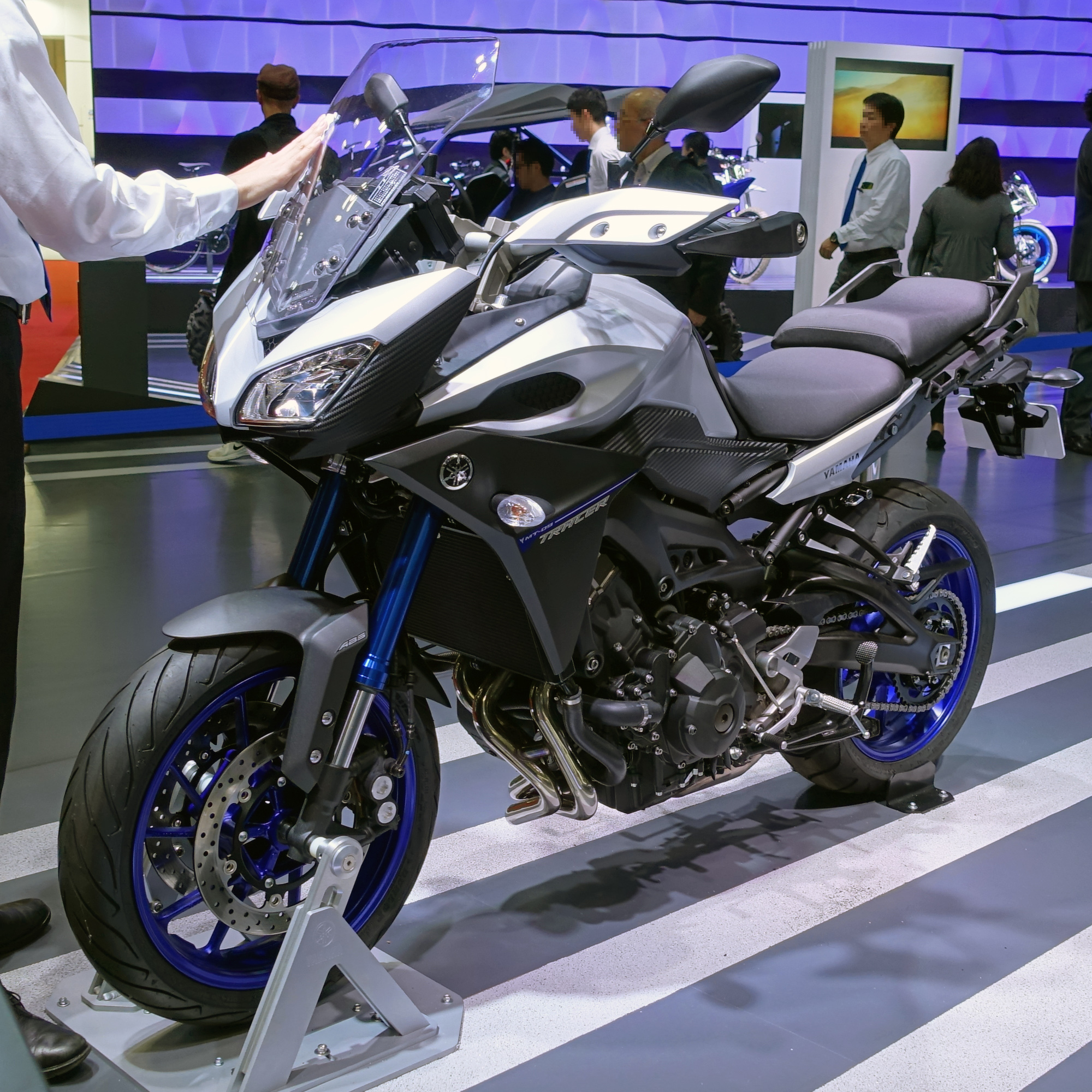 東京モーターショー2015で展示されていたヤマハ・MT-09